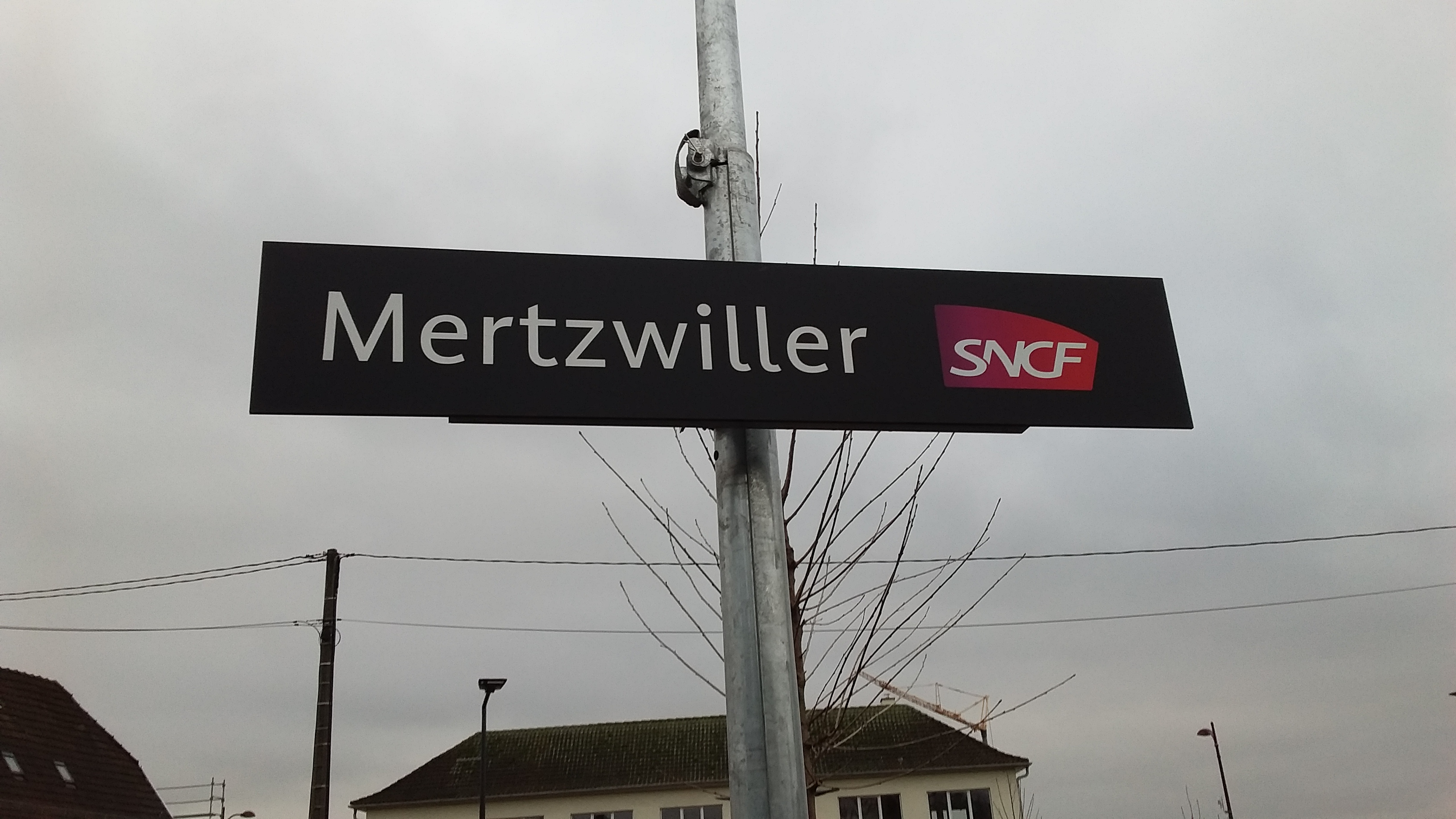 Panneau en Gare de Mertzwiller.